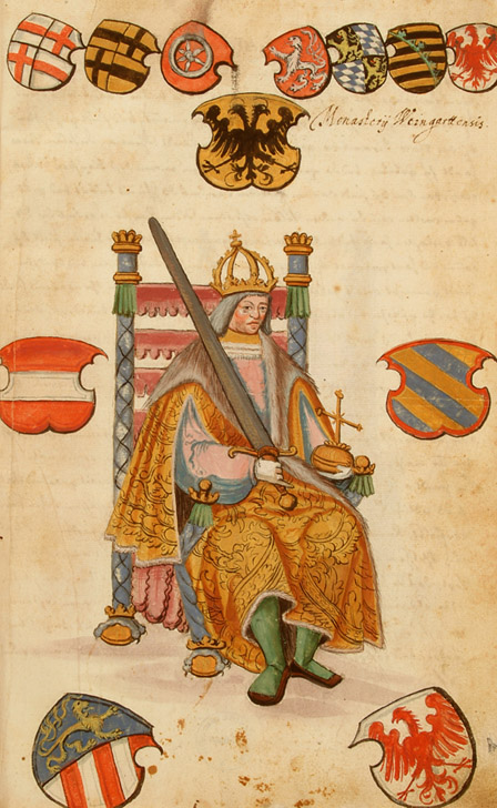 Maximilian I., Miniatur aus einer Papierhandschrift, über ihm die Wappen der Kurfürsten, um 1600 (HStAS B 515 Bd. 5b, Bl. 5 r)